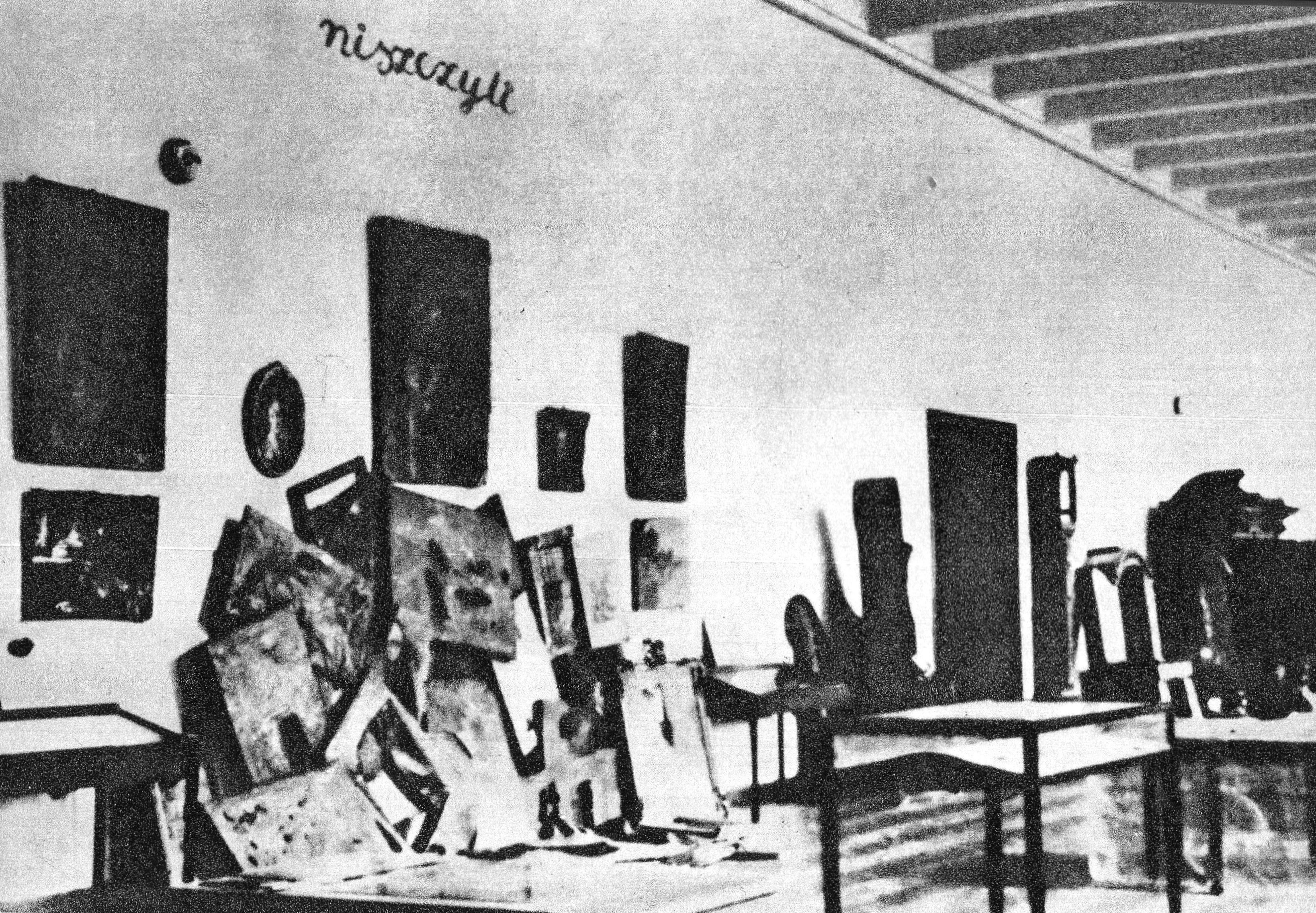 Fragment wystawy Warszawa oskarża w Muzeum Narodowym. Sala ukazująca zniszczenia galerii malarstwa polskiego i obcego.